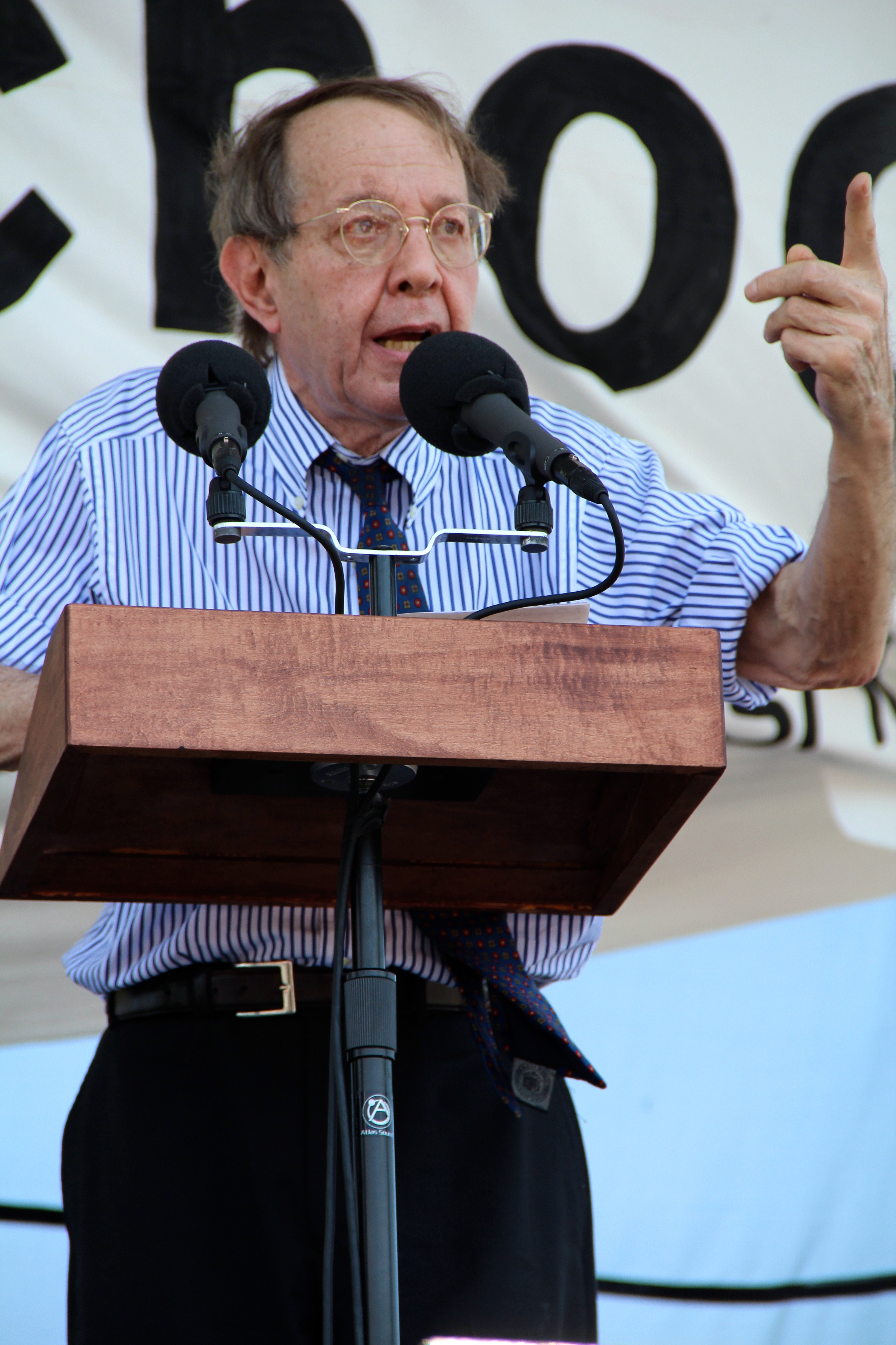 Jonathan Kozol